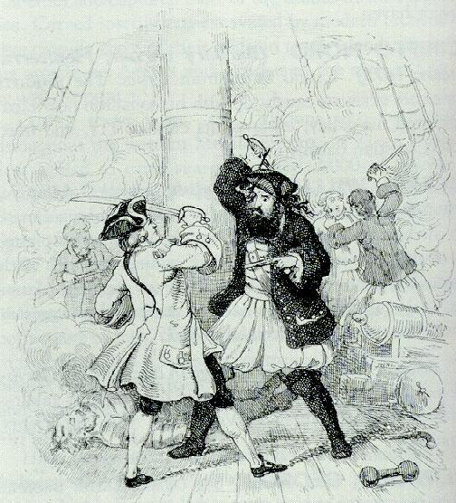 Схватка Черной Бороды с Робертом Мейнардом. Гравюра XVIII в.